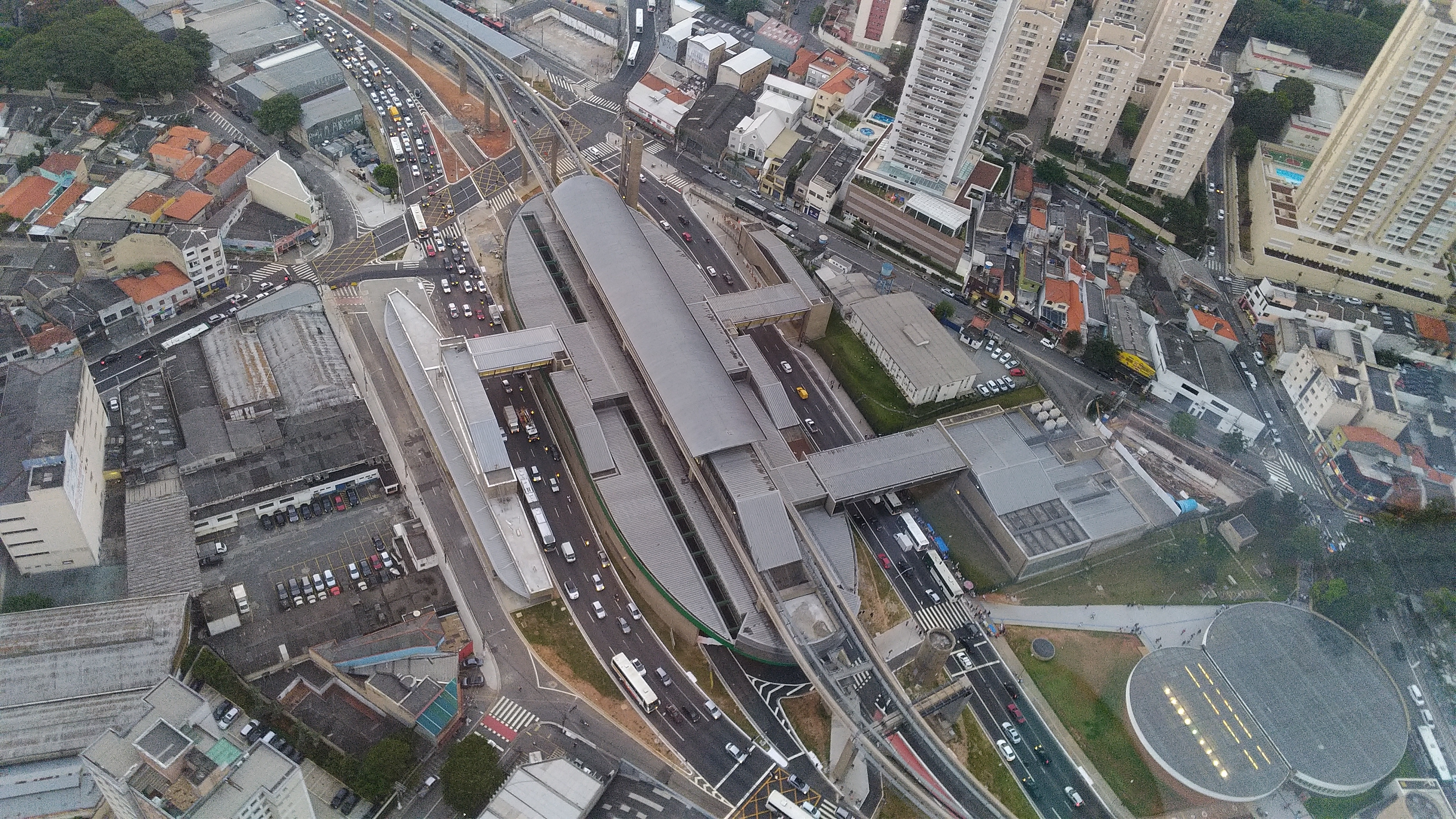 Estação Vila Prudente da Linha 15 Prata do Metrô de São Paulo. Abril de 2018